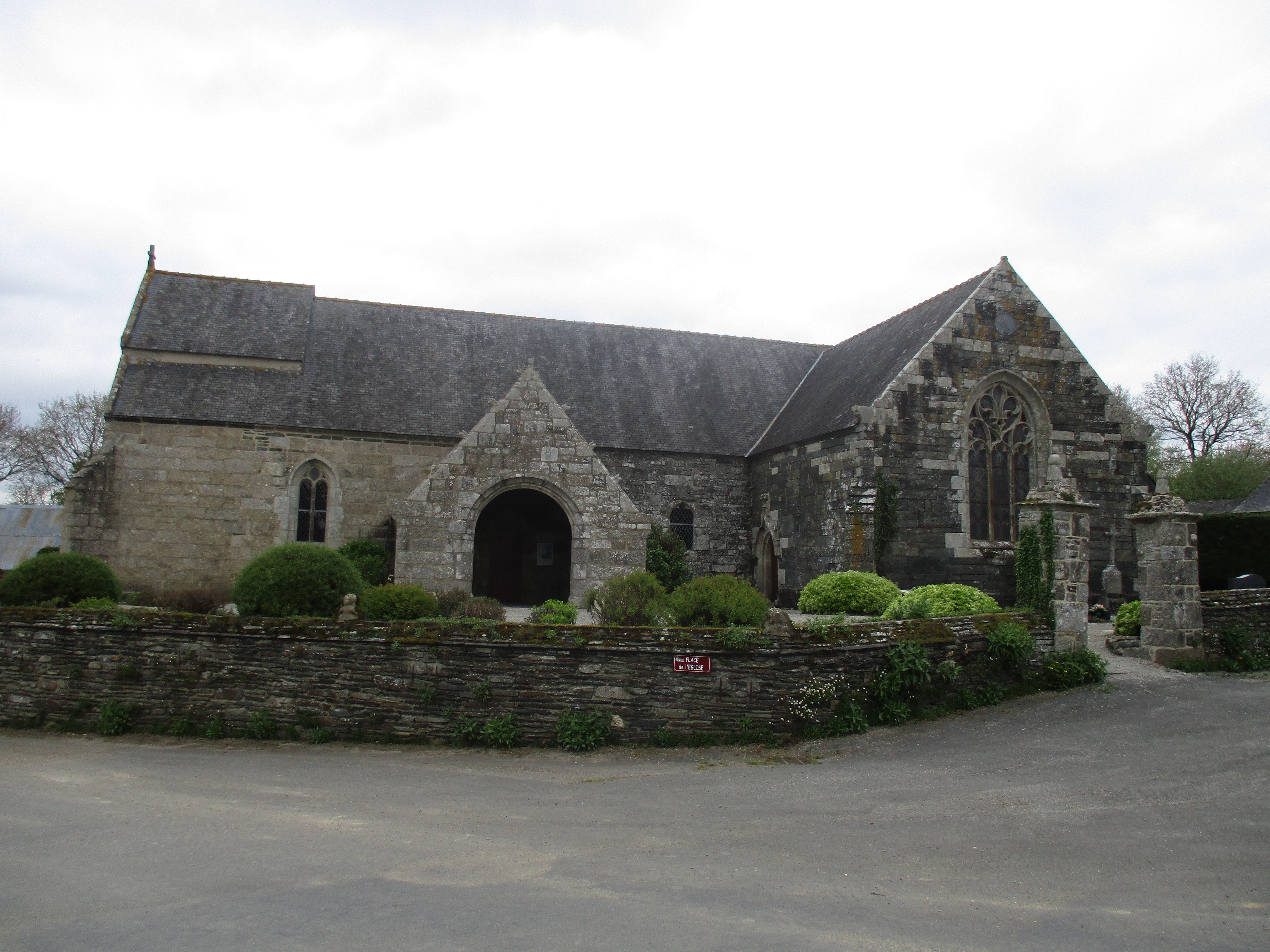 L'église Saint-Ignace de Saint-Ygeaux (22)